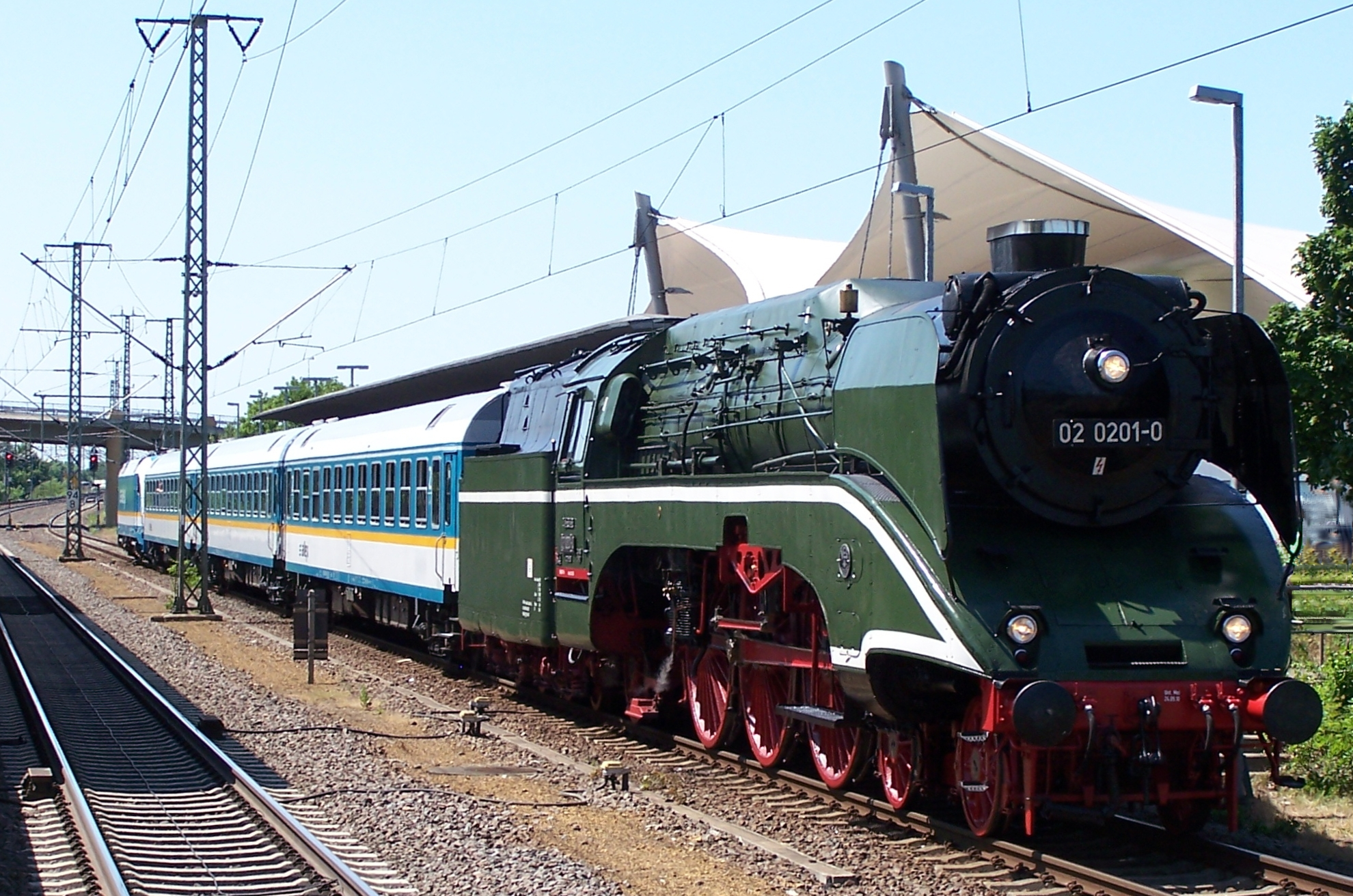 DR 18 201 mit ALEX 183 003 (Siemens ES64U4-G) als Bremslok im Bahnhof Lutherstadt Wittenberg